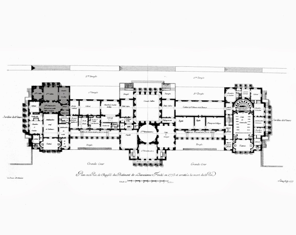 Plan projeté du château de Louveciennes